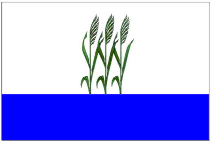 Флаг муниципального образования город Камышин. Волгоградская область, Россия. 2003